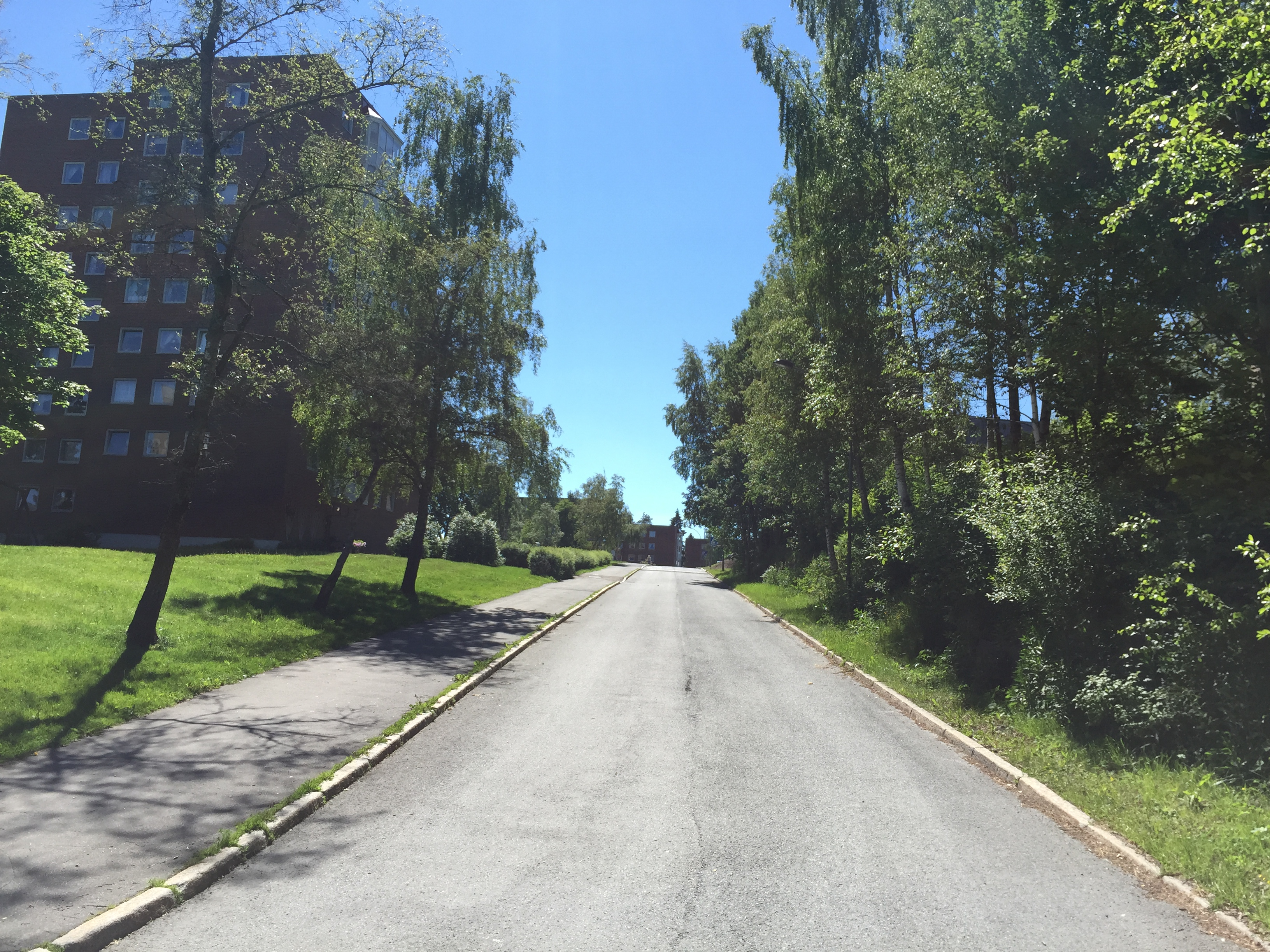 Harald Sohlbergs vei i Oslo.